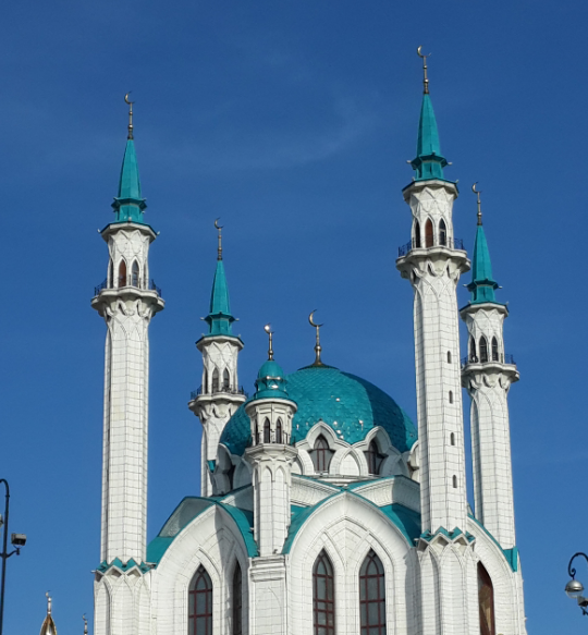 Мечеть Кул-Шариф, Казань